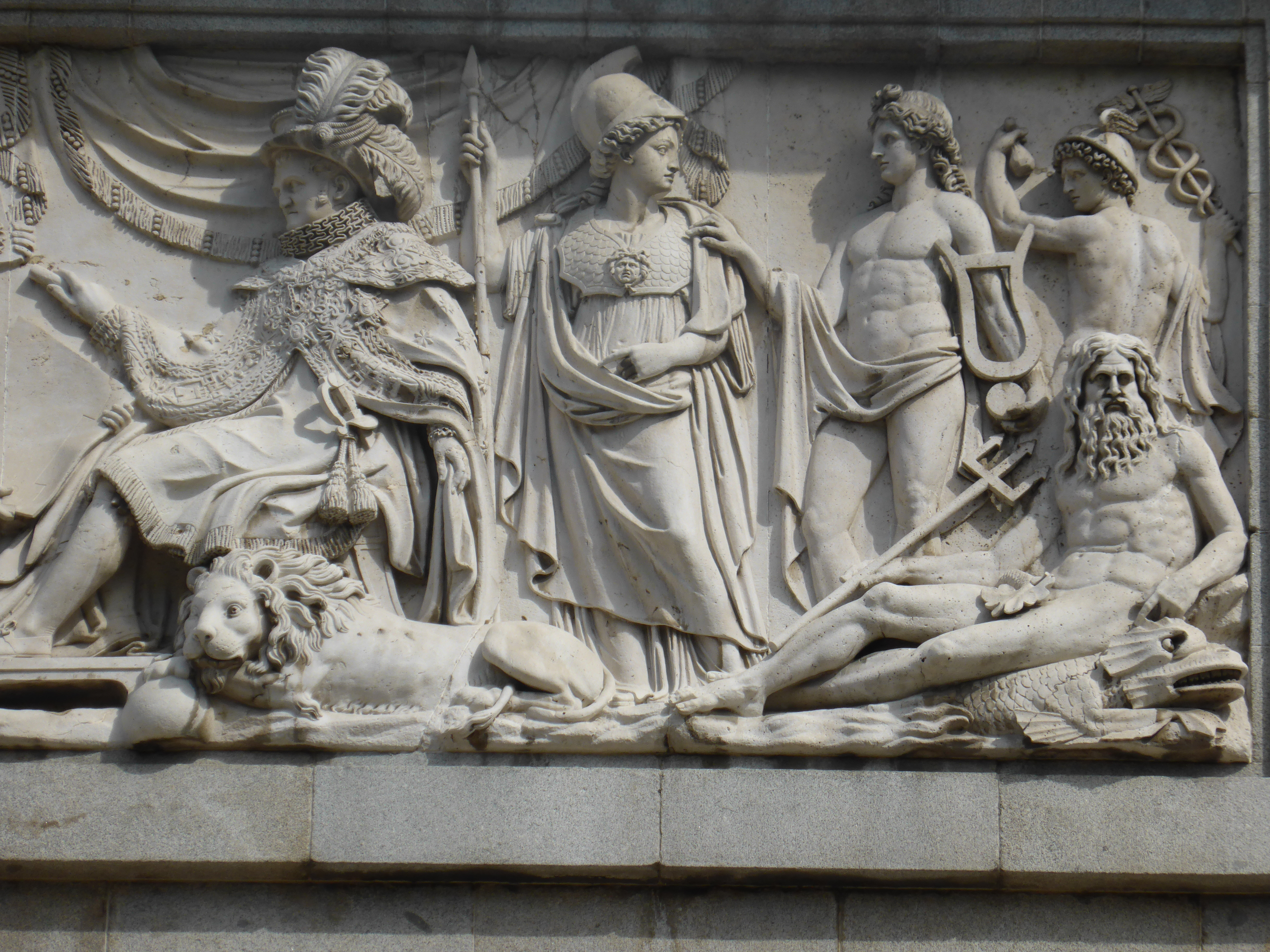 Relieve en la fachada principal del Museo del Prado, en el madrileño Paseo del Prado. El detalle muestra el lado derecho del friso esculpido por Ramón Barba y sus ayudantes, a partir de 1825. Vemos representado al rey Fernando VII, rodeado de dioses de la antiguedad clásica, como Minerva, Mercurio, Apolo y Neptuno (sentado con su tridente).